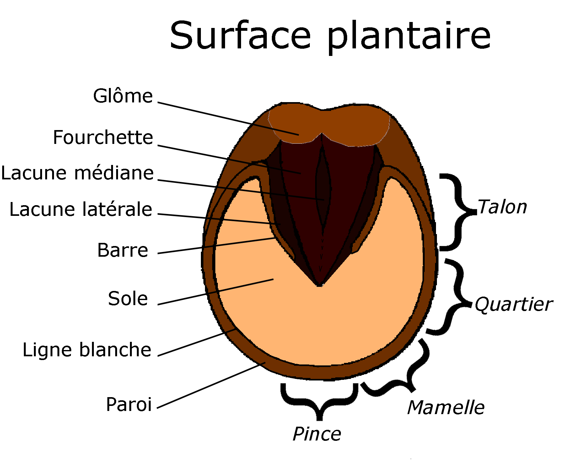 Schéma de la surface plantaire d'un pied de cheval. Auteur Auteur:Bigomar Onkôse 7 août 2006 à 19:10 (CEST)